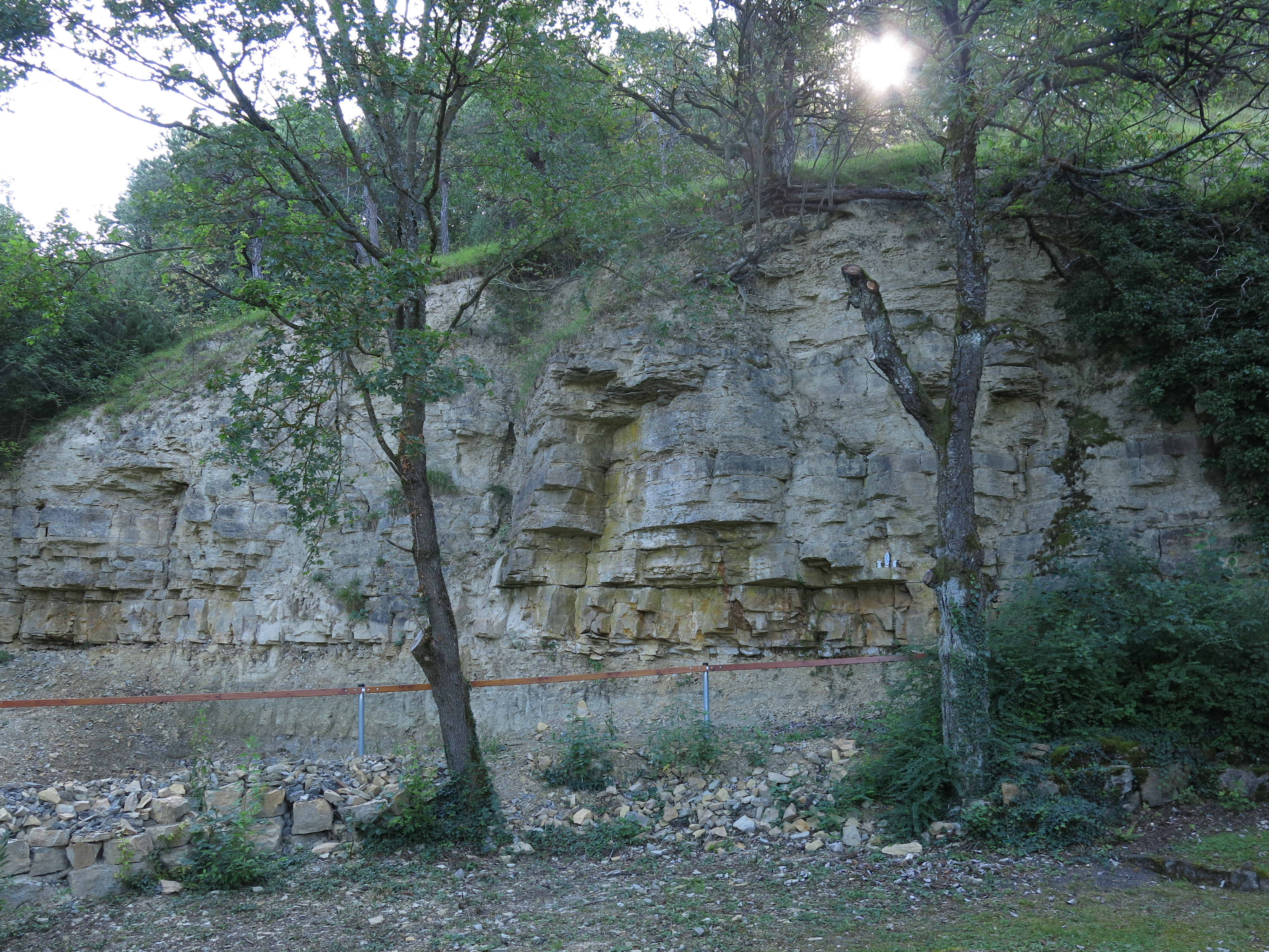 Steinbruch am Grainberg südl. Gambach